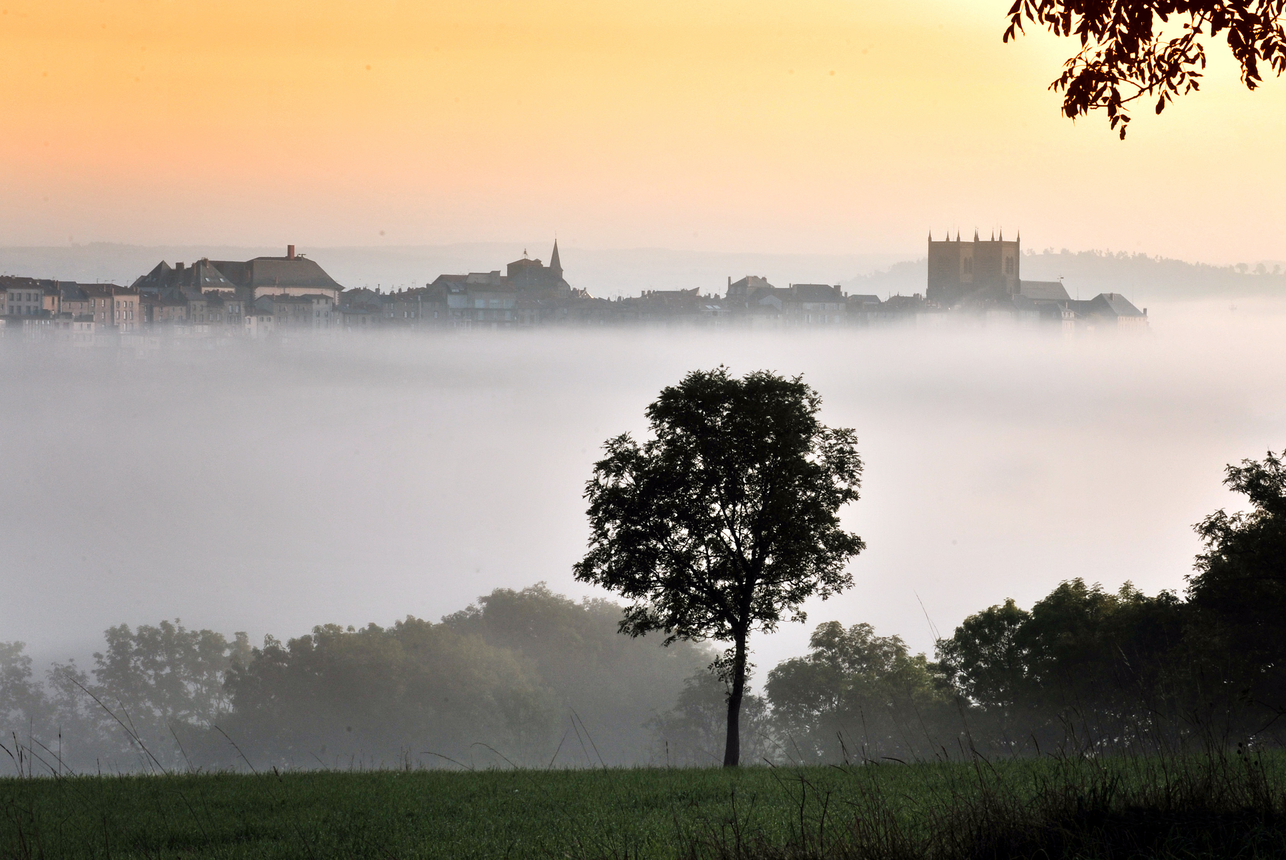 Saint-Flour, "ville haute", entourée par la brume matinale